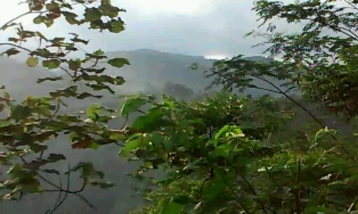 Adalah sebuah bukit yang dibawahnya terdapat gua peninggalan tentara Jepang yang benama gua Basma